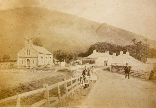 Llun o eiddo teulu Williams, Gilwern Uchaf, Rhostryfan, gyda diolch am y cyfle ï'w gopio. Y dyddiad o dan y llun mewn ysgrifen copperplate yw 10 Awst 1883. “Bettws Garmon photographed by I.Ninsley” sydd odditano.